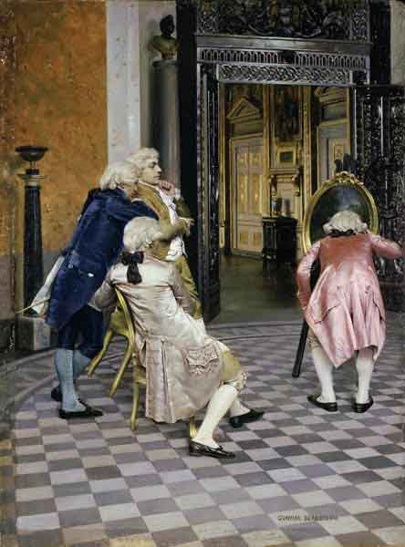 les conaisseurs de l'art